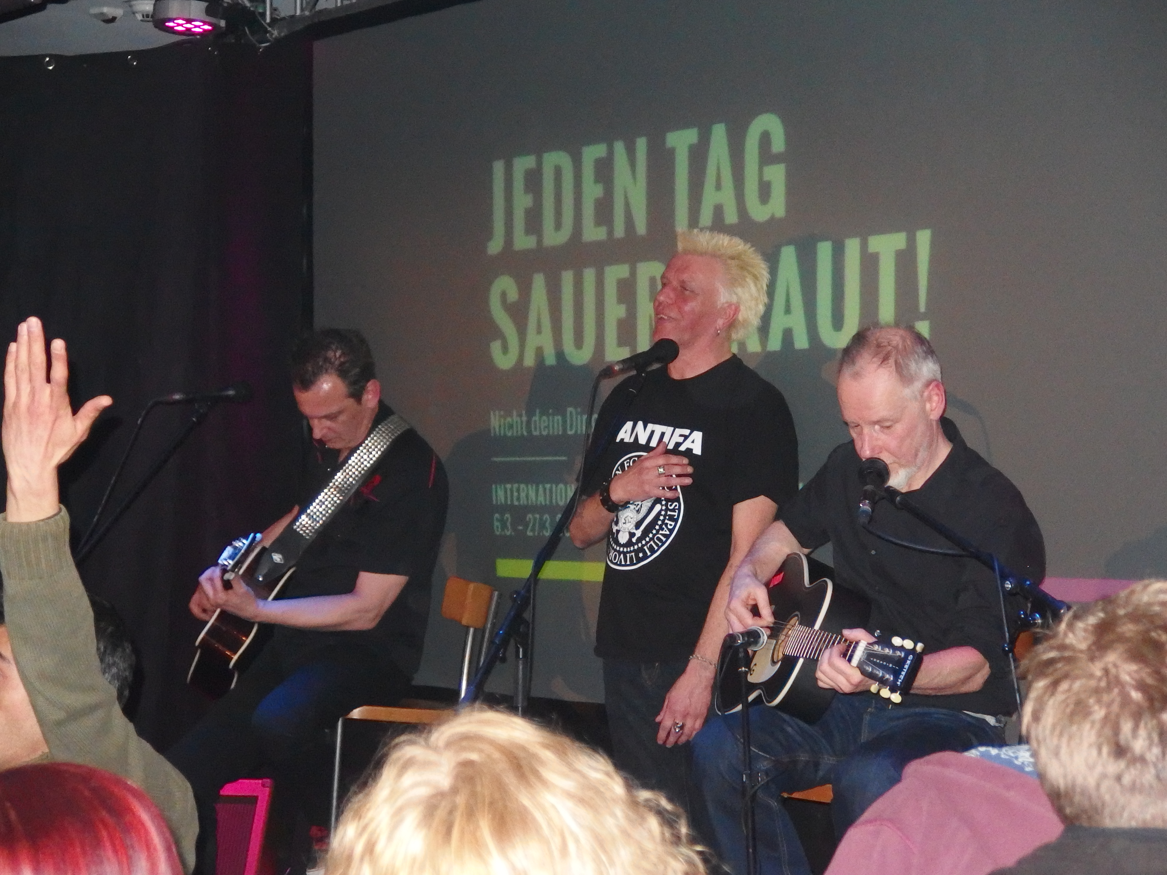 Slime live - Akustikshow im Saarbrücker JUZ Försterstraße